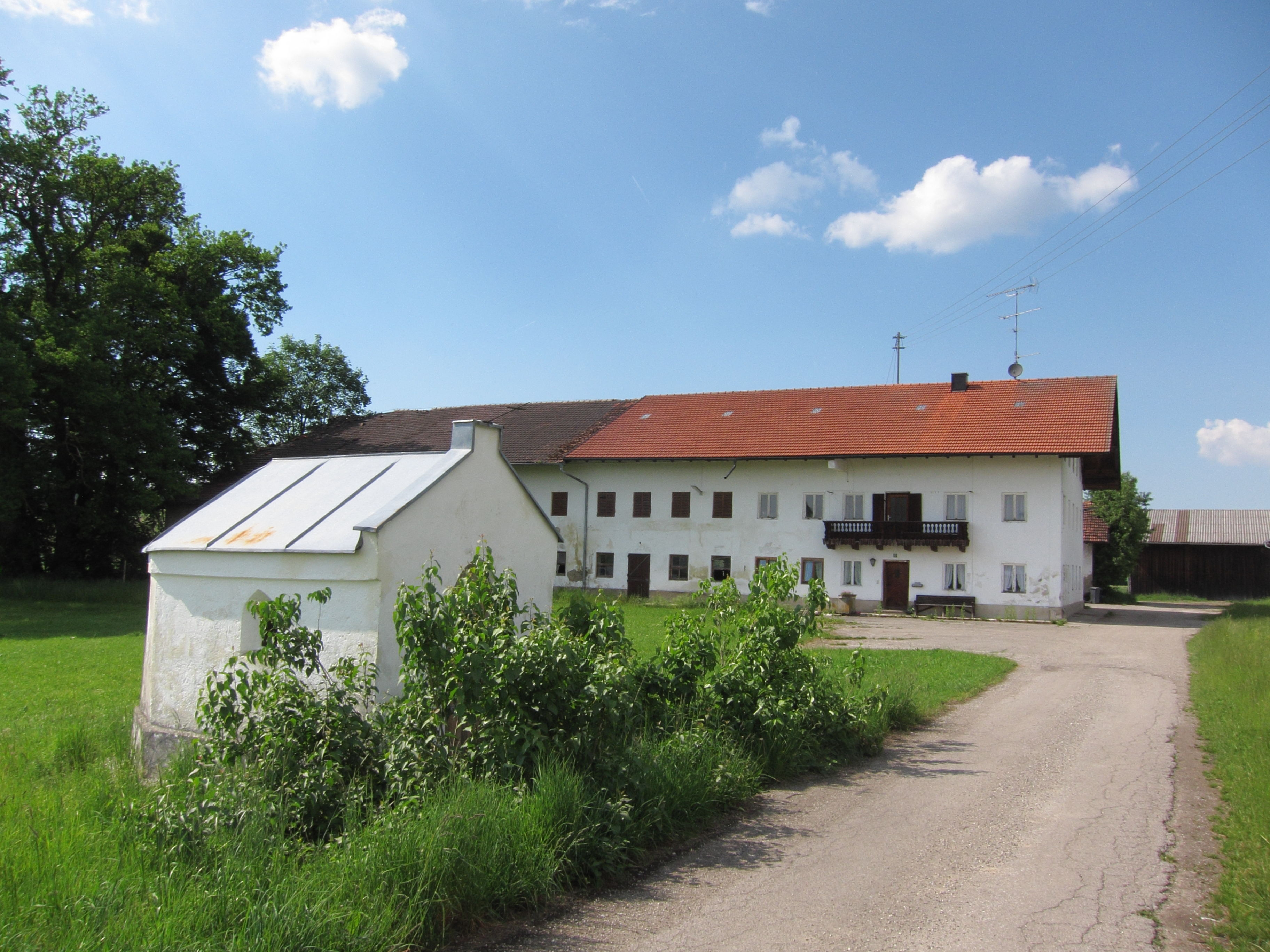 Gasteig, Haus Nr. 24 mit Hofkapelle (Lourdeskapelle), um 1900.